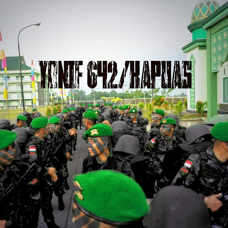 Satgas Yonif 642/Kps melaksanakan upacara pengantar tugas pengamanan perbatasan RI-PNG Th.2013